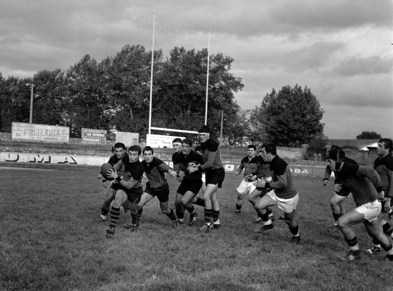 Stade Ernest Wallon. Le 16 Octobre 1966. Vue d'une phase de jeu entre le Stade Toulousain et l'équipe de Carmaux.